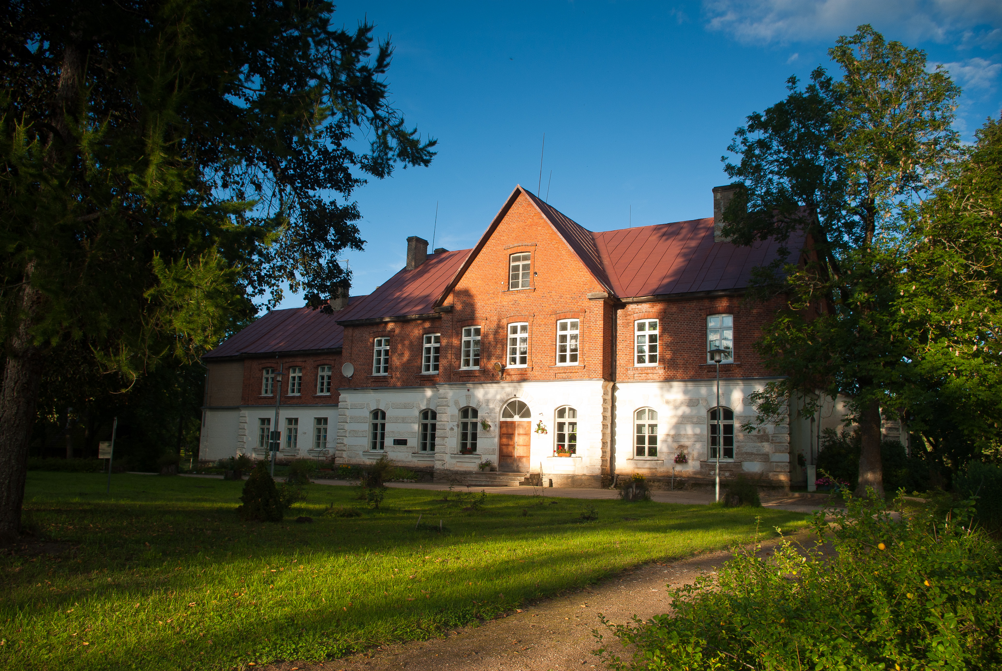 Viitina mõisahoone